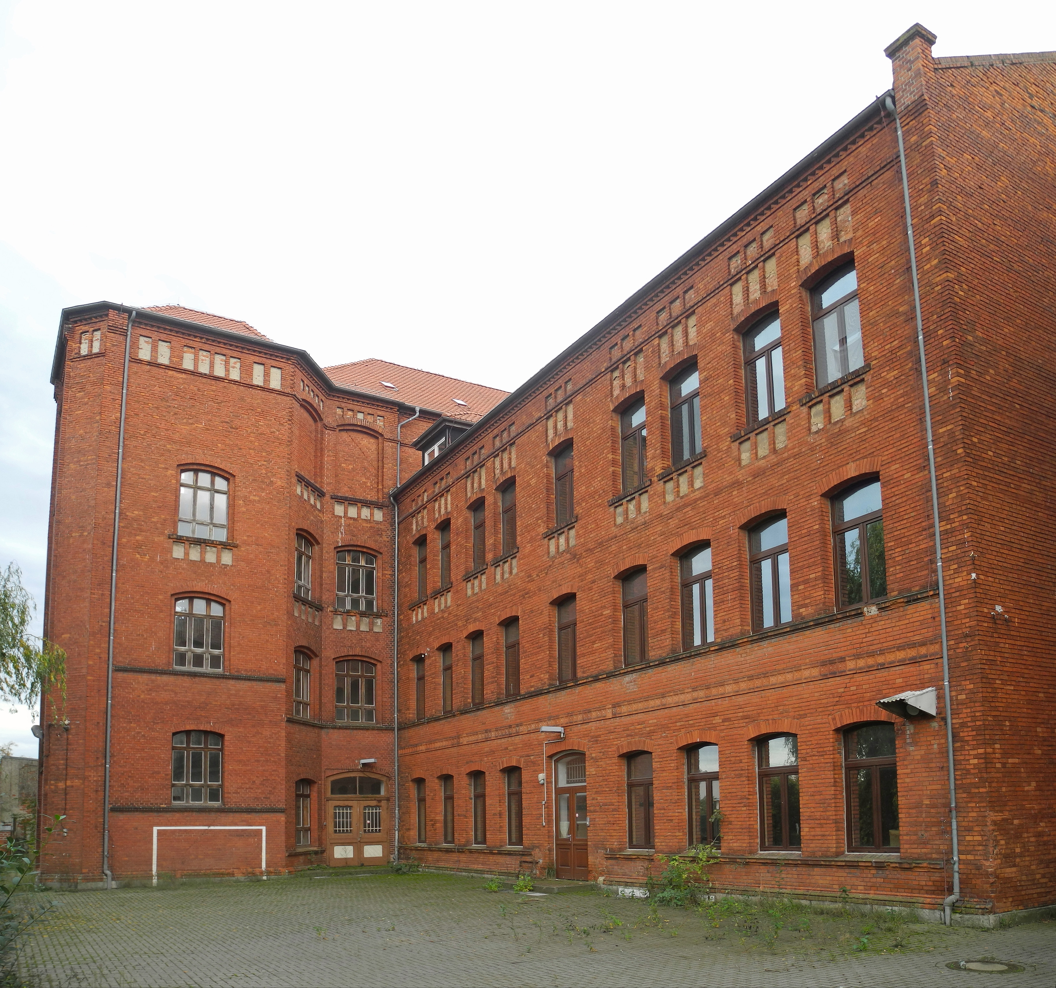 Ehem. Realschule in Calbe (Saale), Schulstr. 3 – ab 1945 Oberschule bzw. Erweiterte Oberschule Karl Marx (EOS), dann Goethe-Oberschule (bis 1991), danach Grundschule „J. W. von Goethe“ (bis nach 2000)